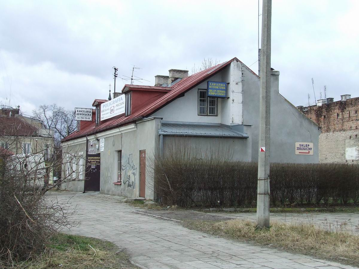 Mykwa, obecnie sklep zoologiczny i kafejka internetowa